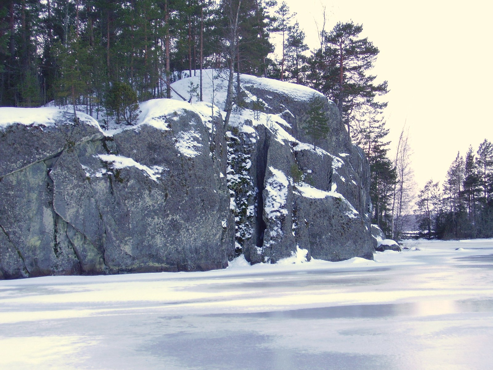 Vohlissaaren kalliohalkeama